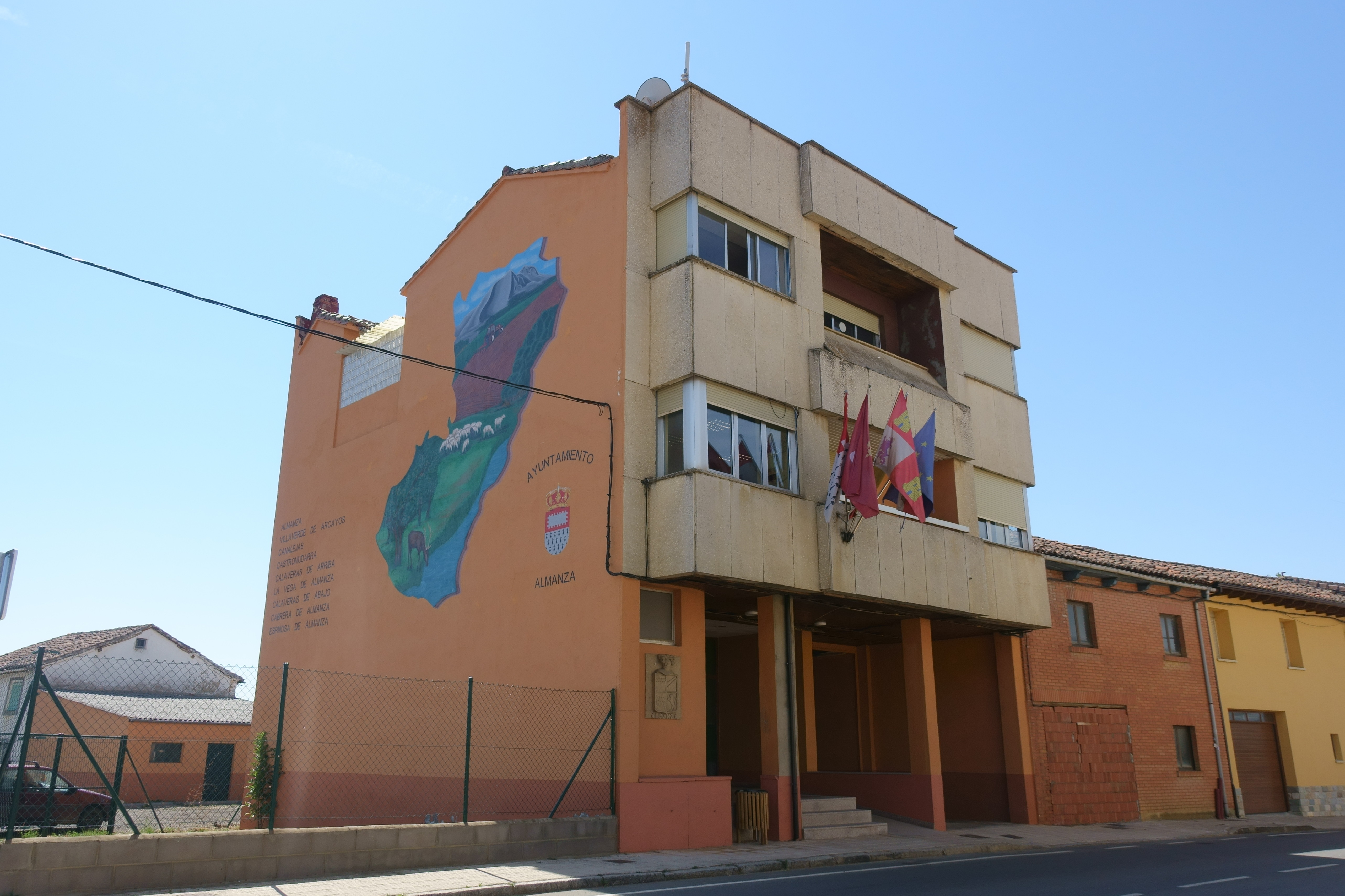 Casa consistorial de Almanza (León, España).